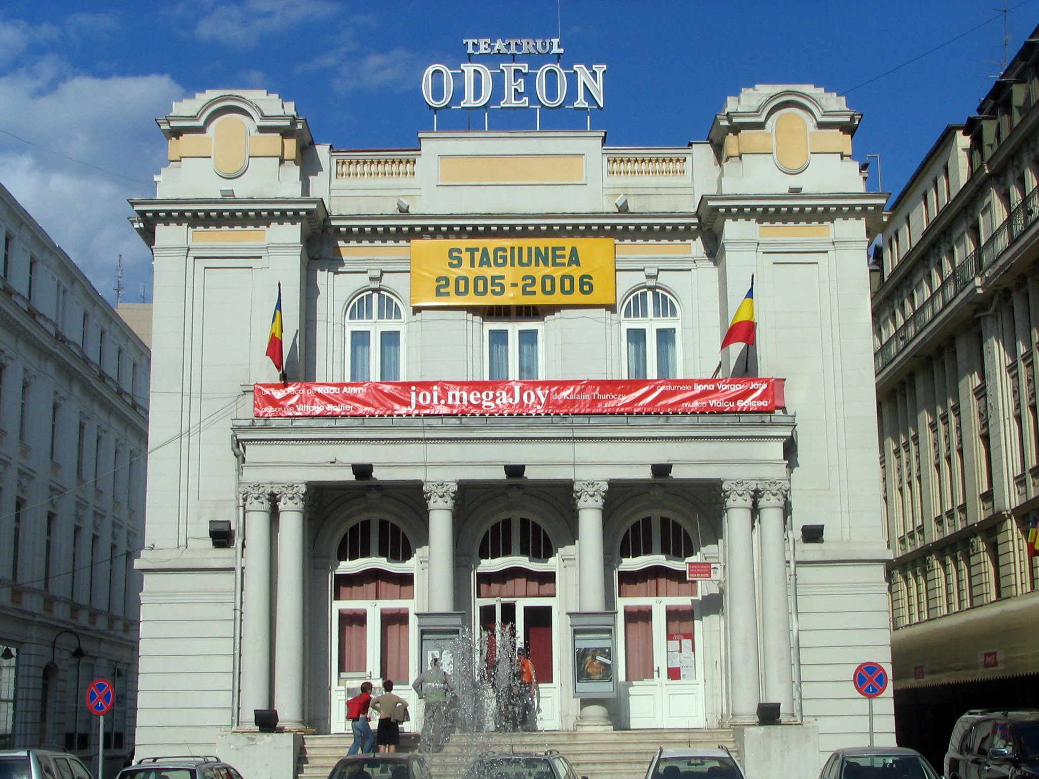 Teatru Odeon din Bucureşti